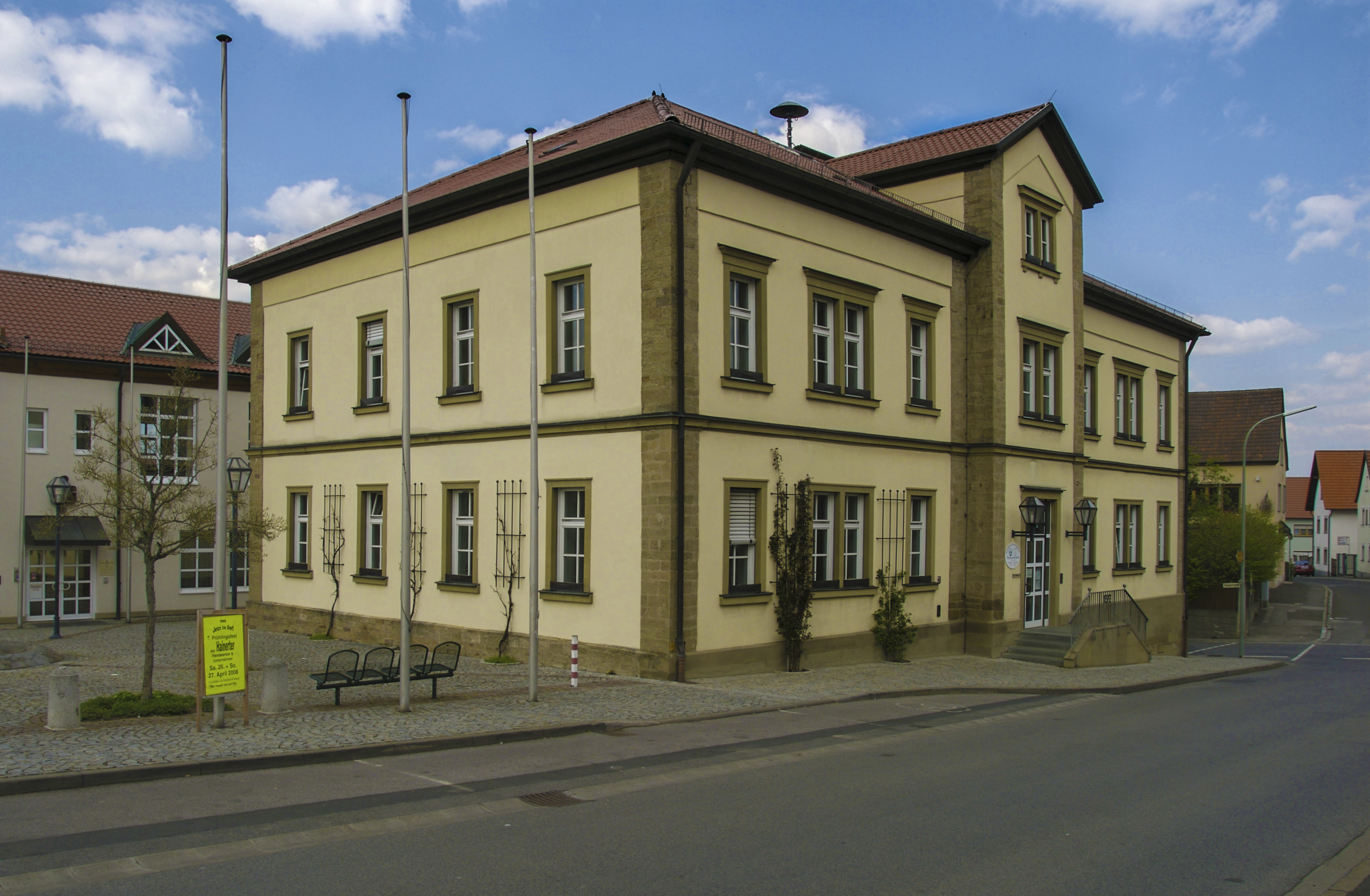 Das heutige Rathaus (die ehemalige Volksschule) der Gemeinde Knetzgau in Unterfranken (Bayern)